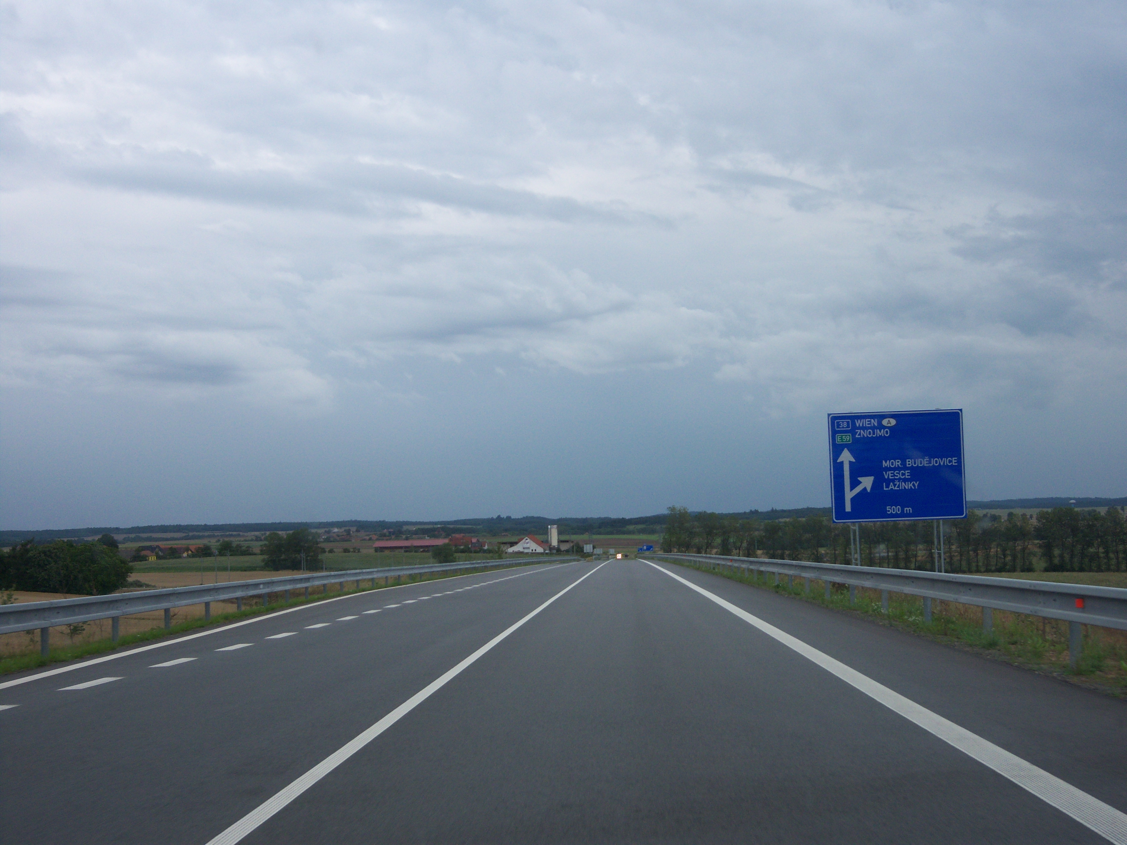 Silnice I/38 Jihlava–Znojmo: Moravske Budejovice